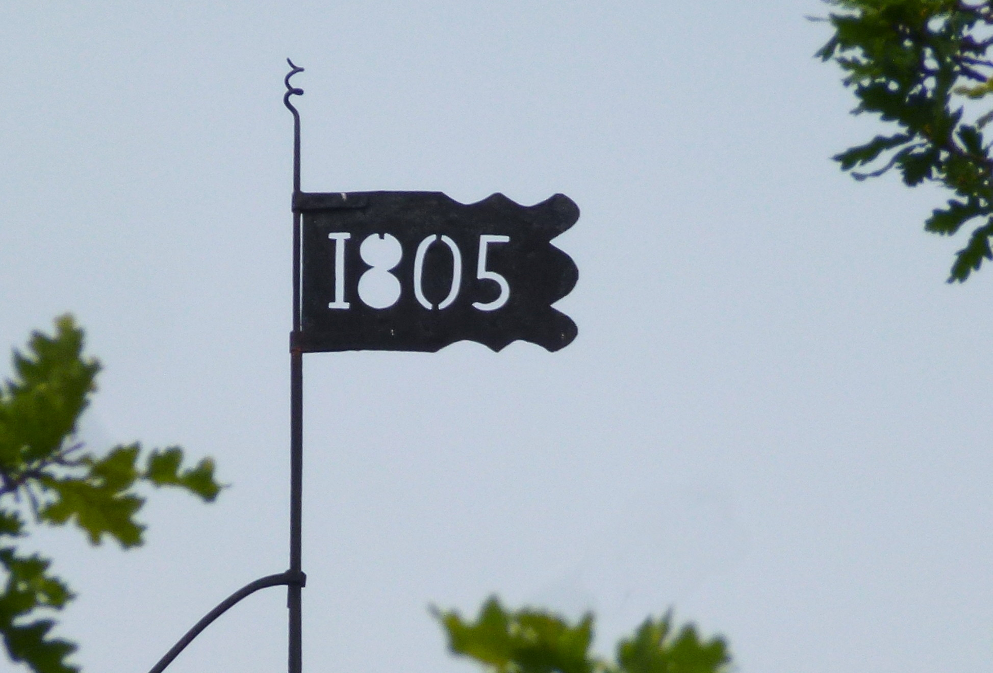 Hammarbacken, vindflöjel på sädesmagasinet.